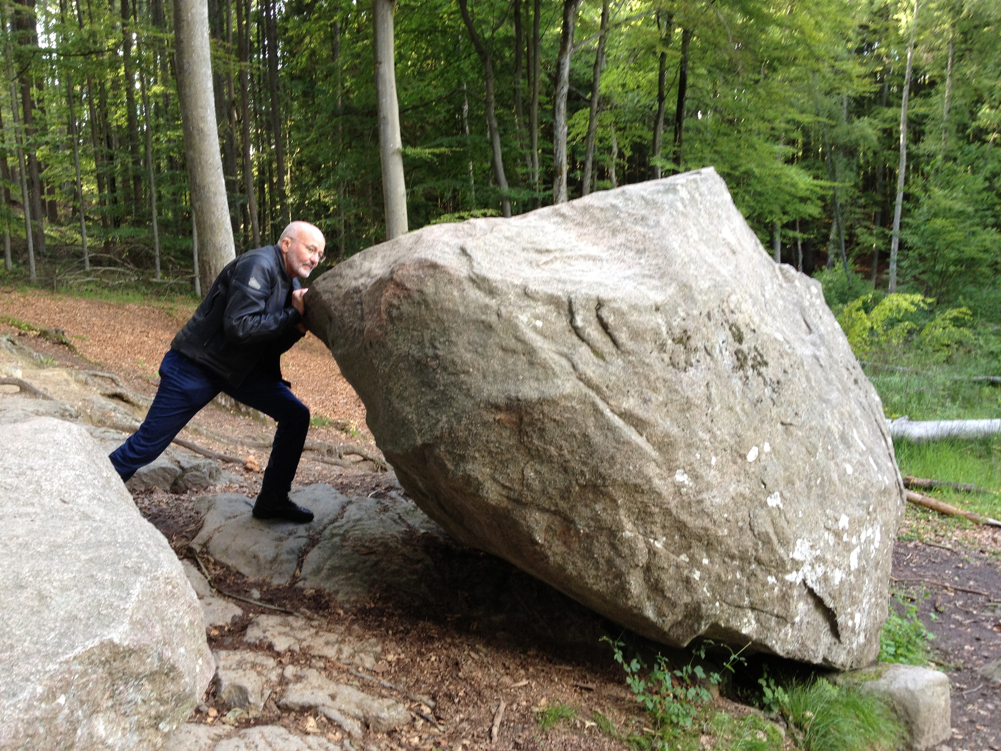 Rokkestenen i Paradisbakkerne på Bornholm.